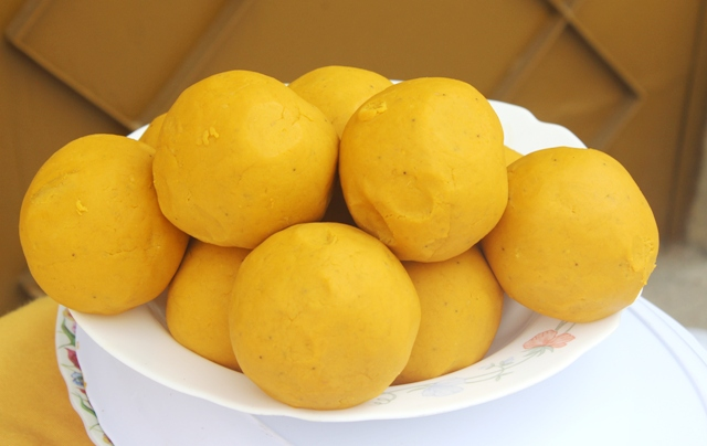 genre de foutou appelé foufou fait à base de banane plaintain